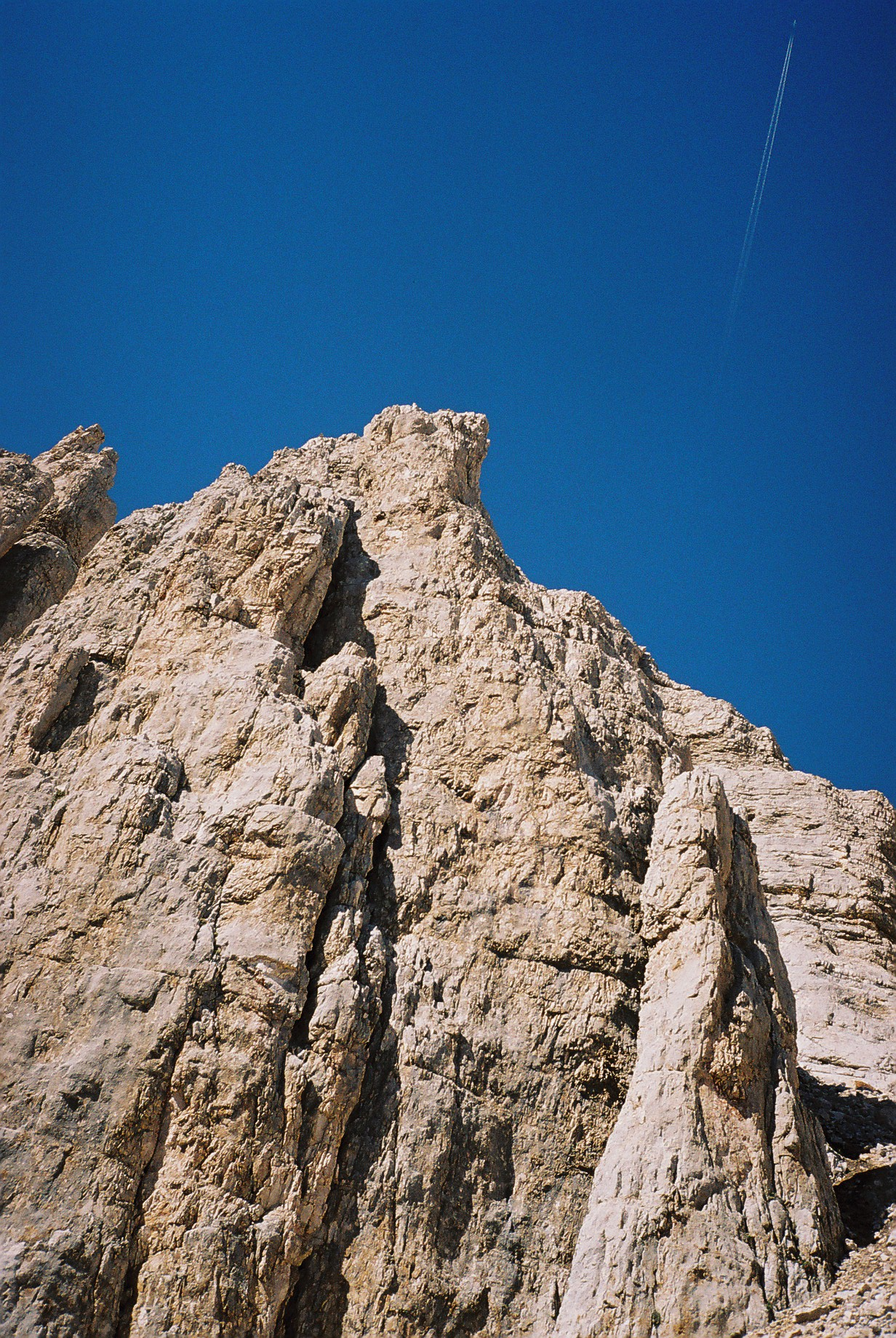 Landschapje op de Latemar-flank (Zuid-Tirol, Italië) in 2004. Eigen werk, vrij voor het publiek.